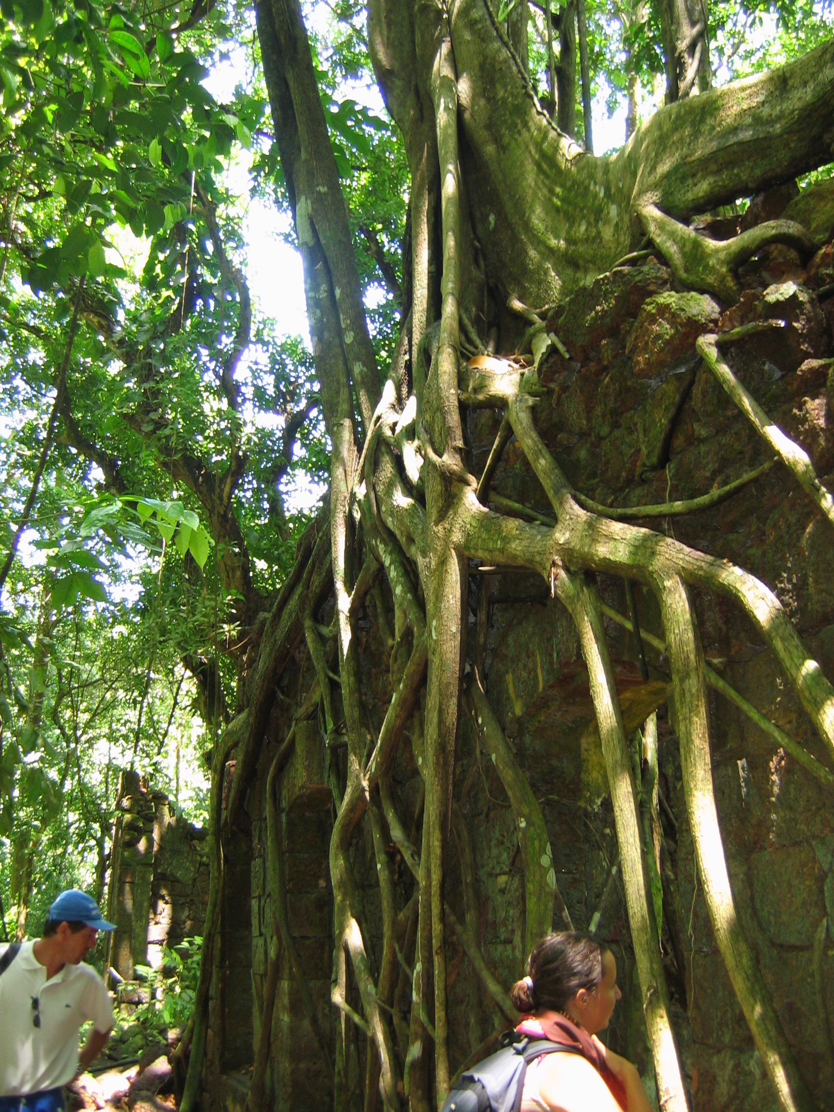 Bagne de la motagne d'argent à l'embouchure de l'oyapock